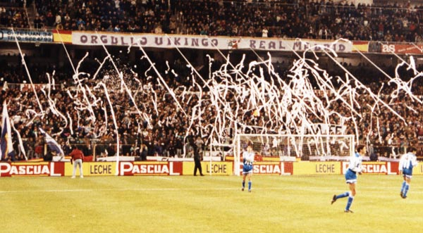 Foto de Orgullo Vikingo el el partido Real Madrid-Deportivo de la Coruña, en la temporada 1992/1993.